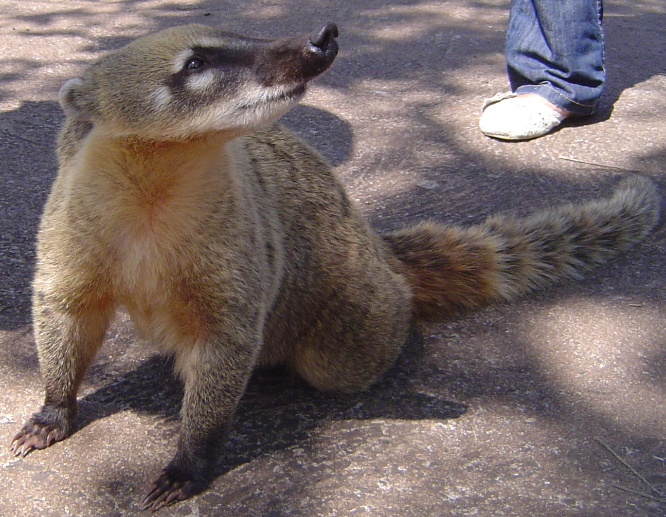 Coatí, especie que habita en el Parque Nacional Iguazú.